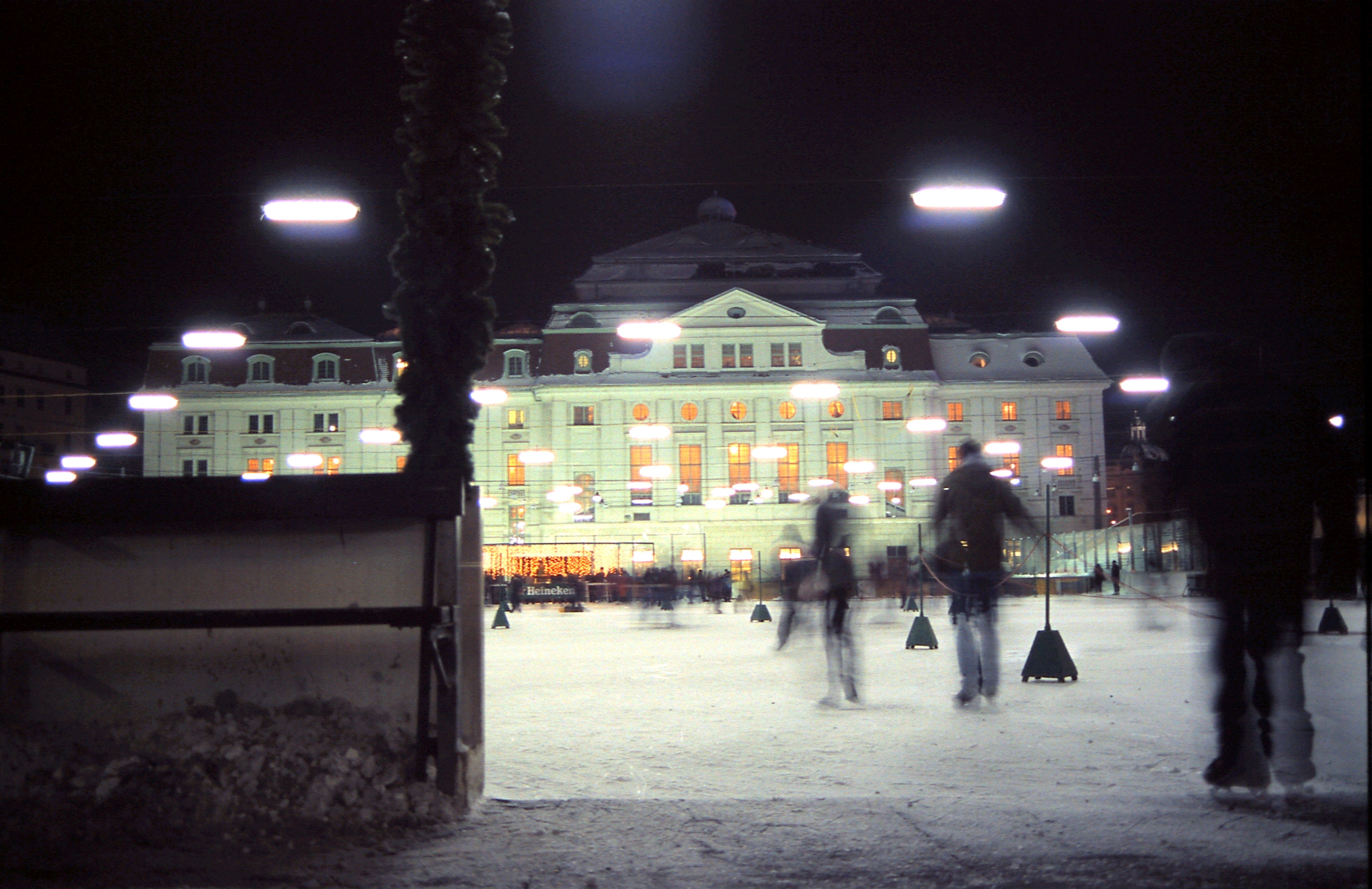 Eisfläche des Wiener Eislaufvereins im November 2010